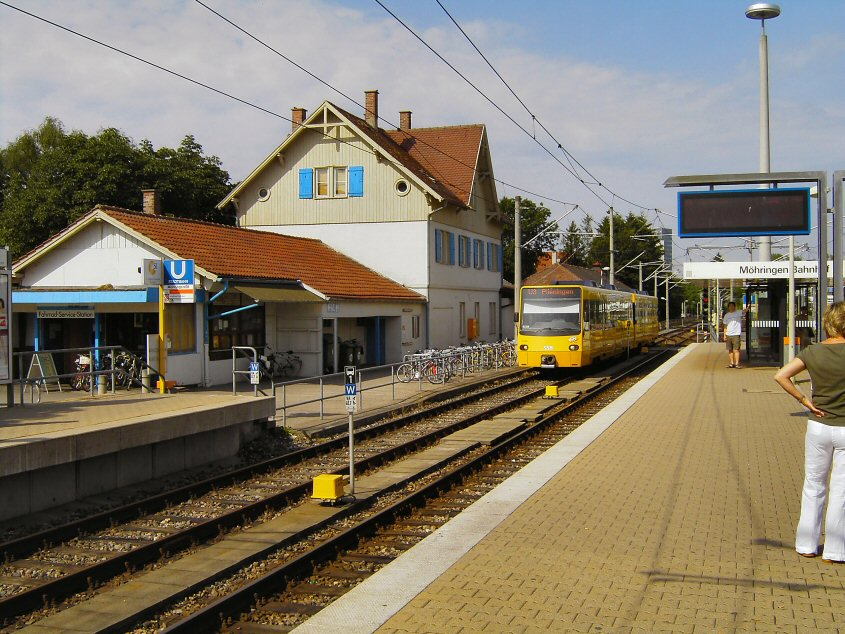 Möhringen Bahnhof, einst Betriebsmittelpunkt der Filderbahn, heute Stadtbahnknoten. Im Hintergrund das Empfangsgebäude